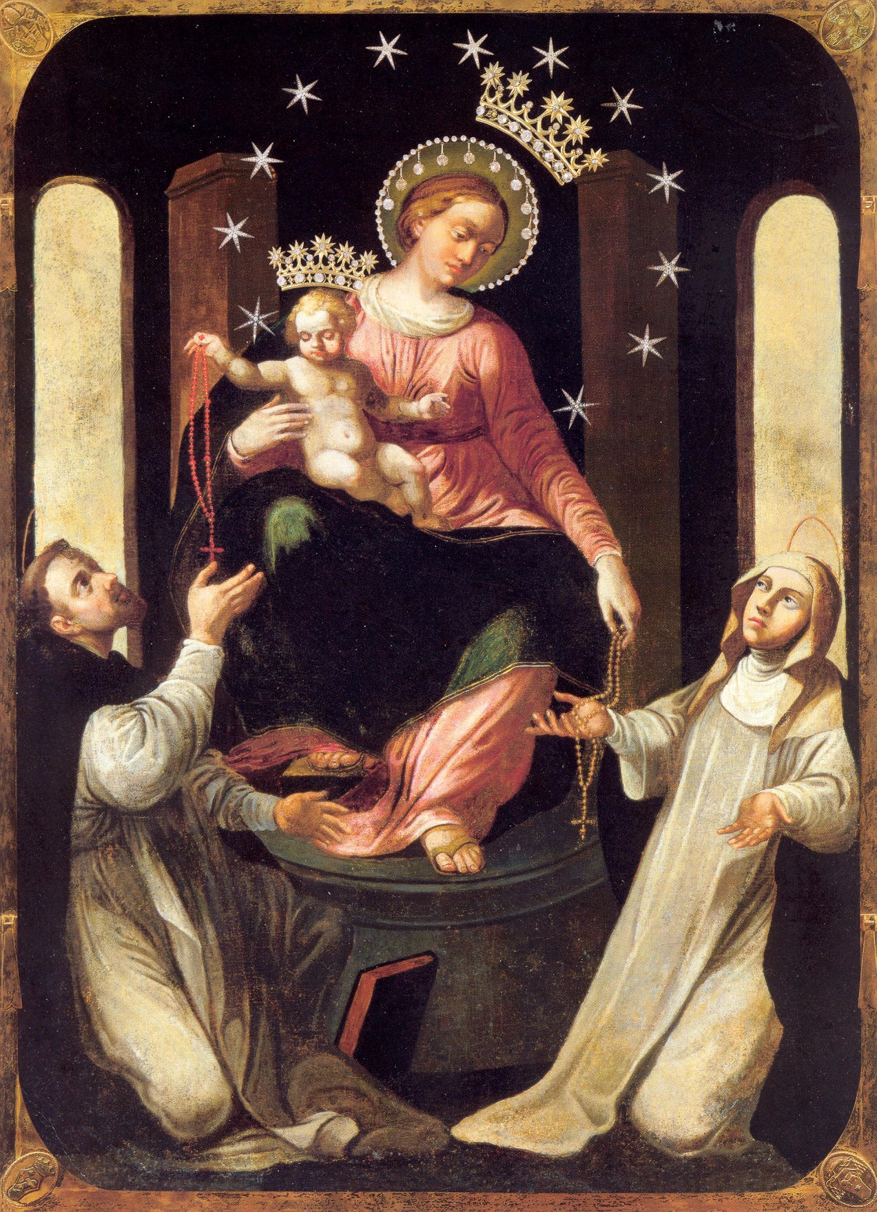 Obraz Matki Bożej Pompejańskiej ze św. Dominikiem i św. Katarzyną Sieneńską.